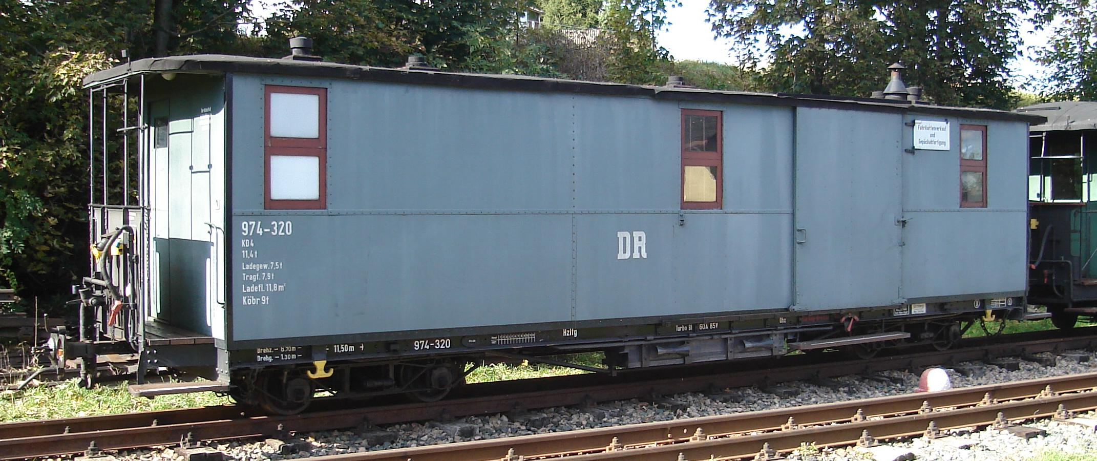 Gepäckwagen 974-320 in Schönheide Mitte; Baujahr 1915, Gattung 711 der K.Sä.St.EB, bis 1972 der Schmalspurbahn Wilkau-Haßlau–Carlsfeld im Einsatz, danach an privat verkauft, seit 1997 bei der Museumsbahn Schönheide